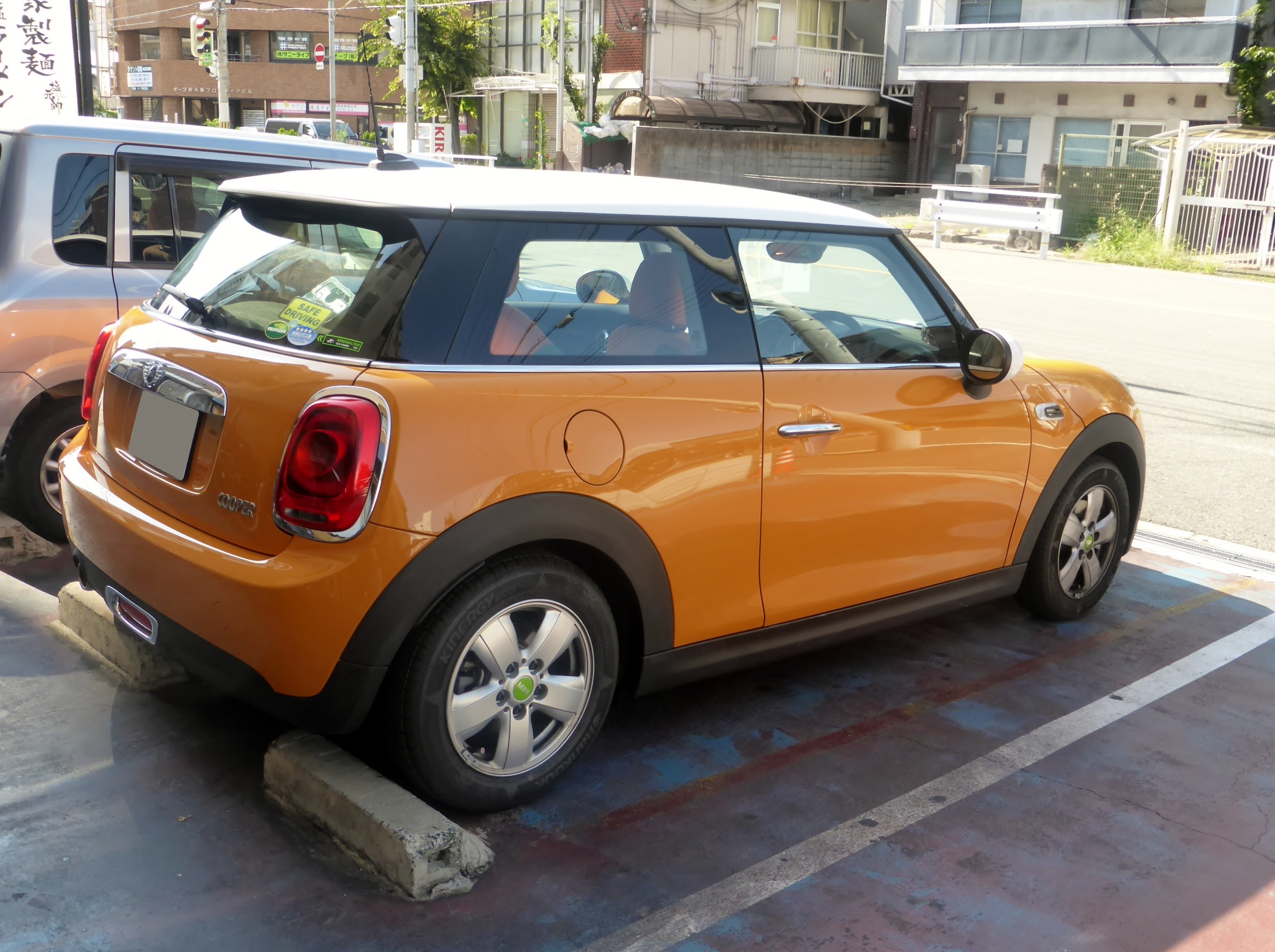 F56型BMW・ミニクーパーをリアから撮影。